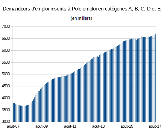 Évolution du chômage en France selon Pole emploi, toutes catégories confondues, août 2007 - août 2017.